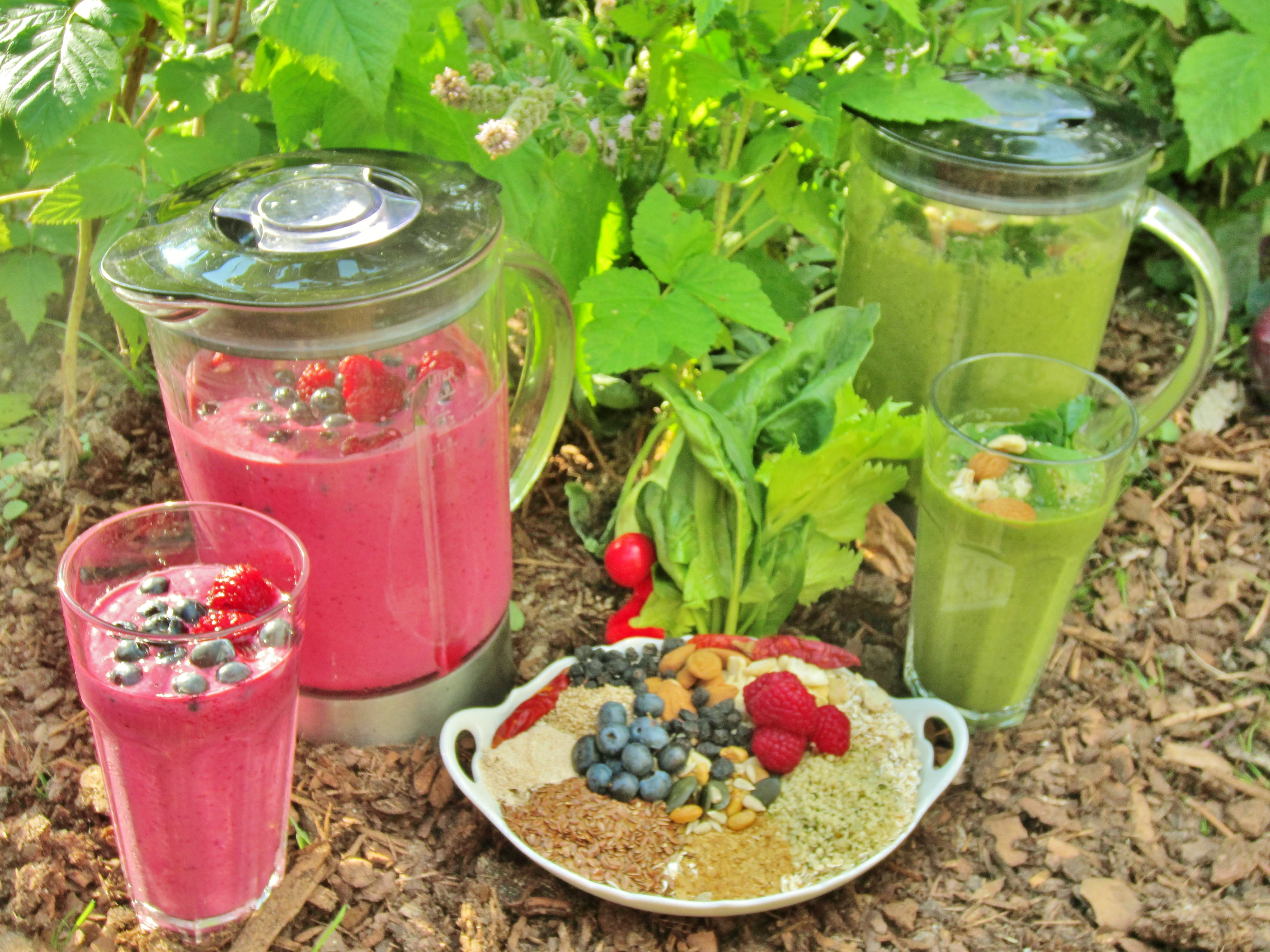 GEOlaviva #GrüneSmoothies #greenSmoothies #Smoothies # rawfood #cleaneating